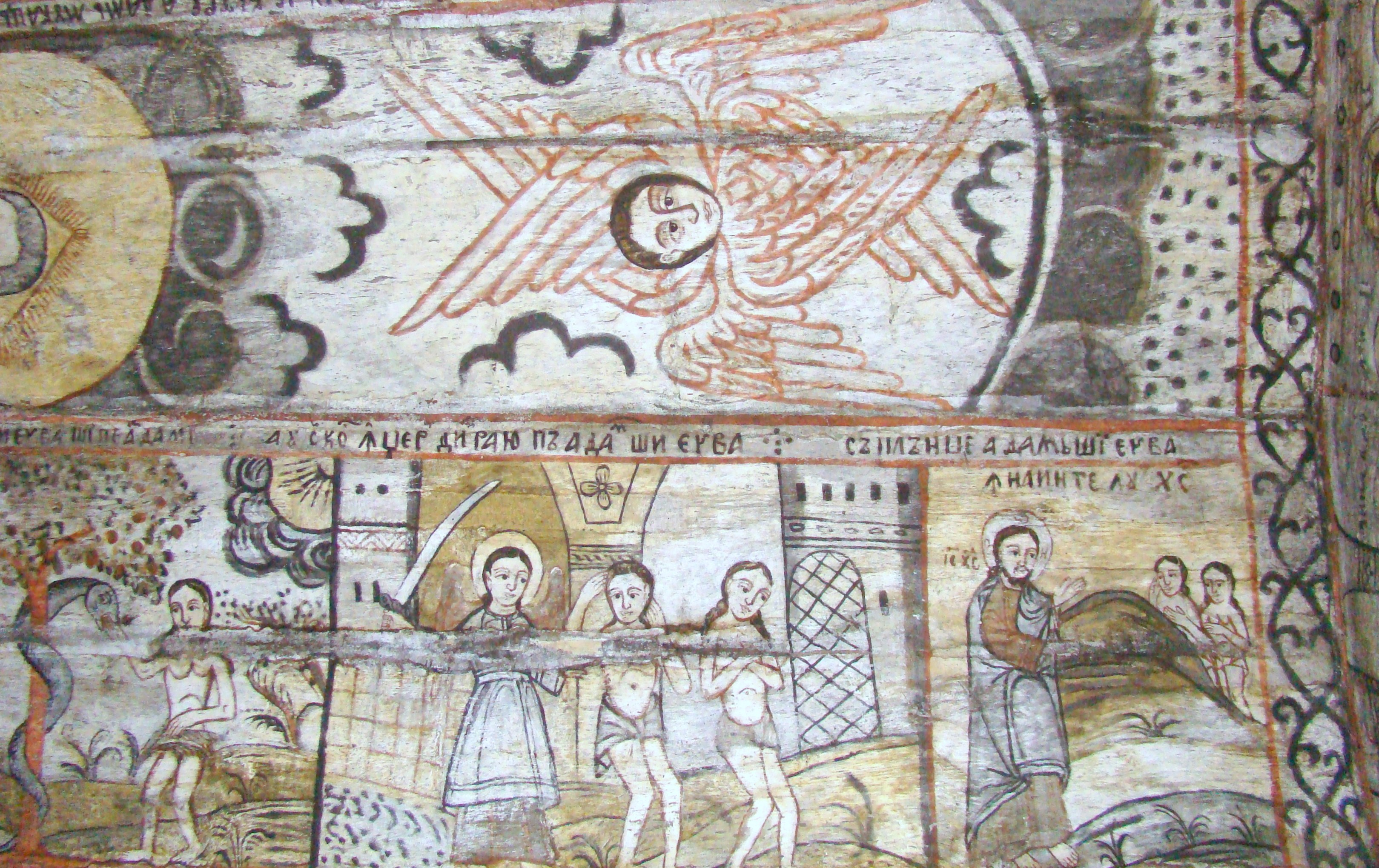 Biserica de lemn „Nașterea Maicii Domnului” din Călinești-Căeni, județul Maramureș